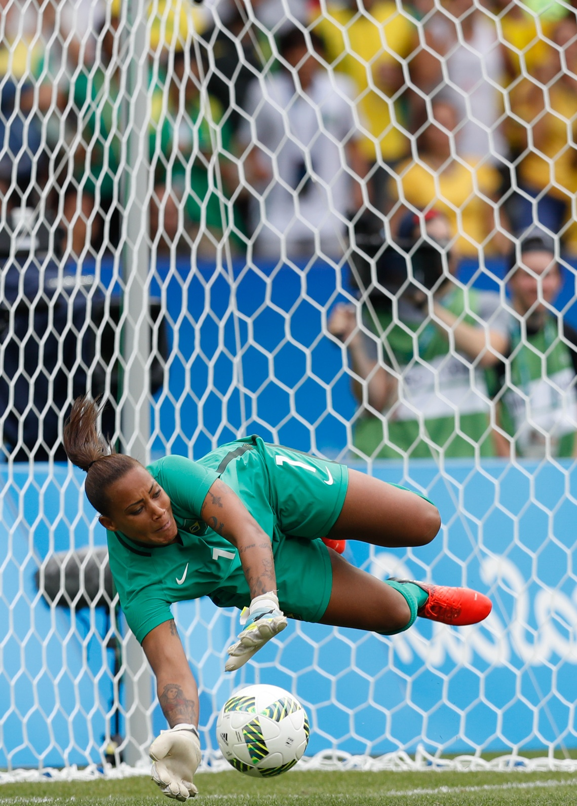 Rio de Janeiro - Seleção brasileira de futebol feminino disputa semifinal com a Suécia, no Maracanã. O Brasil perde nos pênaltis e vai disputar o bronze (Fernando Frazão/Agência Brasil)